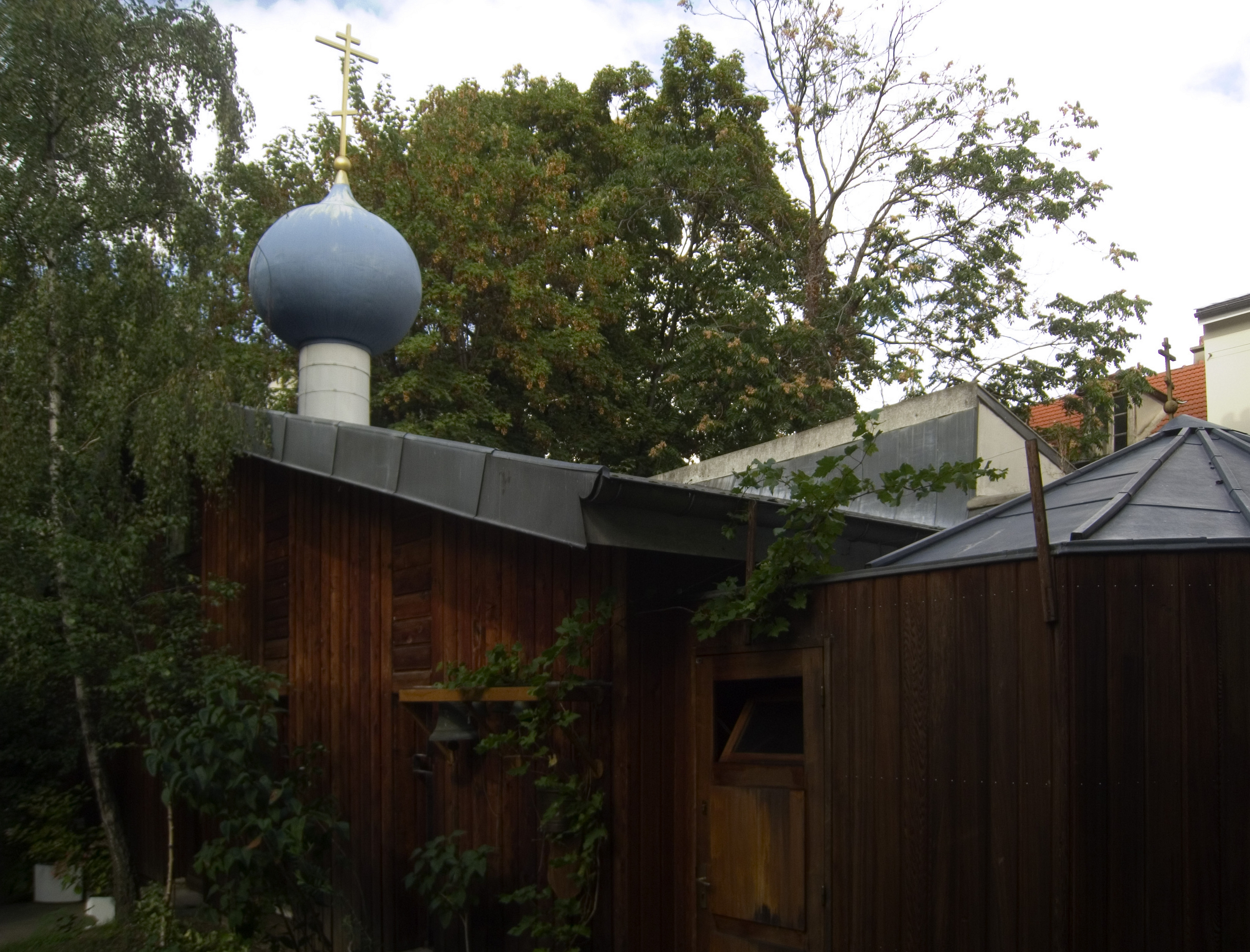 Bâtie par d'anciens russes blancs dans les années 1930, l'église Saint-Séraphin-de-Sarov ressemble à un baraque au fond d'une cour du 15e arrondissement. D'ailleurs, c'est à la base une baraque au fond d'une cour du 15e arrondissement, transformée en église.